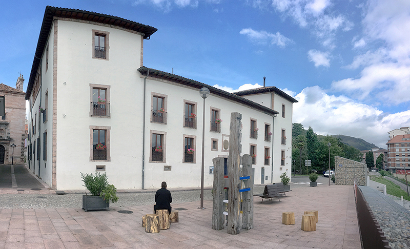 Plaza de Eliseo Nicolás Alonso, Lise, IMG 0832